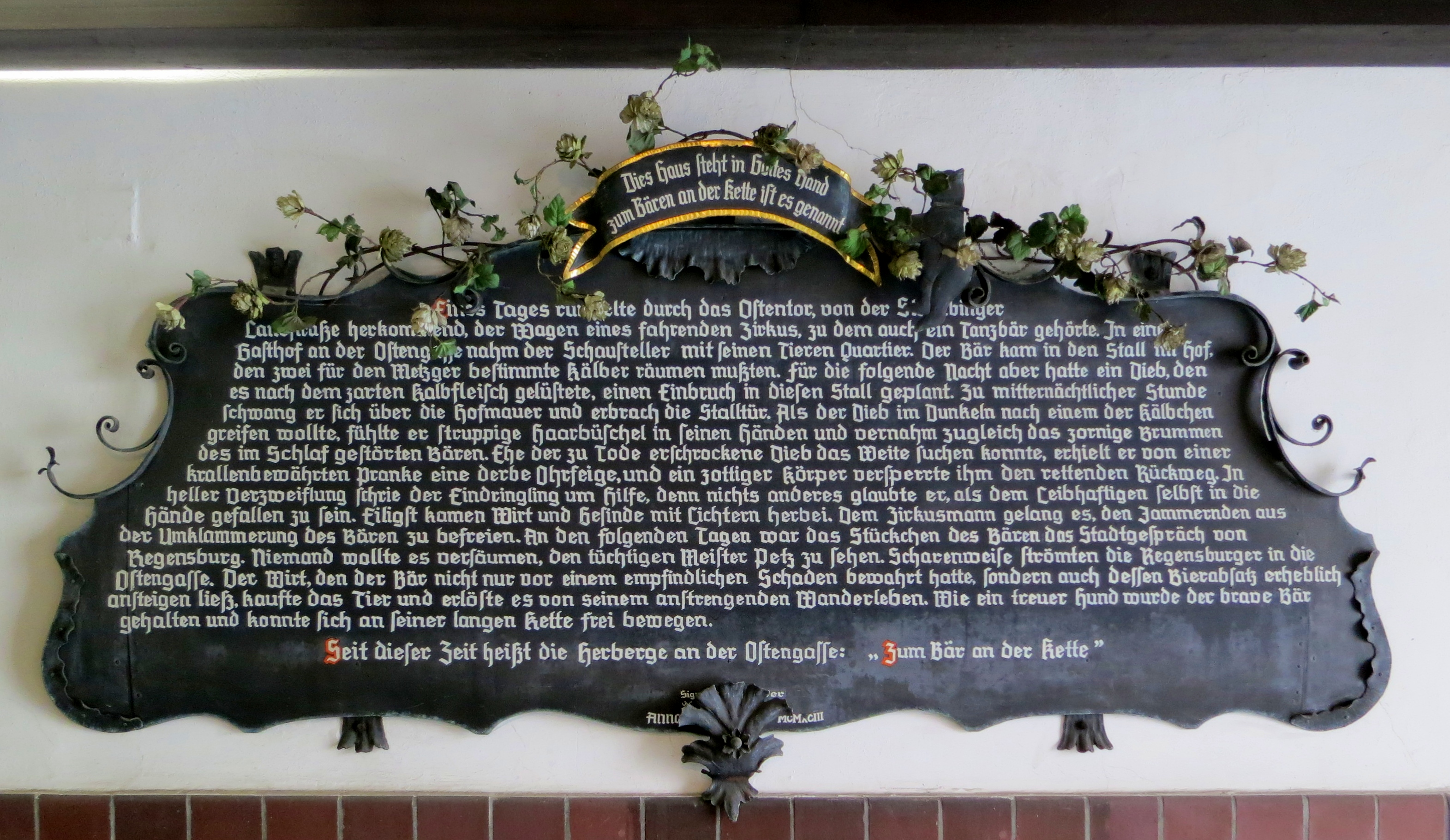 Baudenkmal Ostengasse 16 in Regensburg. Sogenannte Wirtschaft "Zum Bären an der Kette". Verziertes eisernes Schild in der Tordurchfahrt.